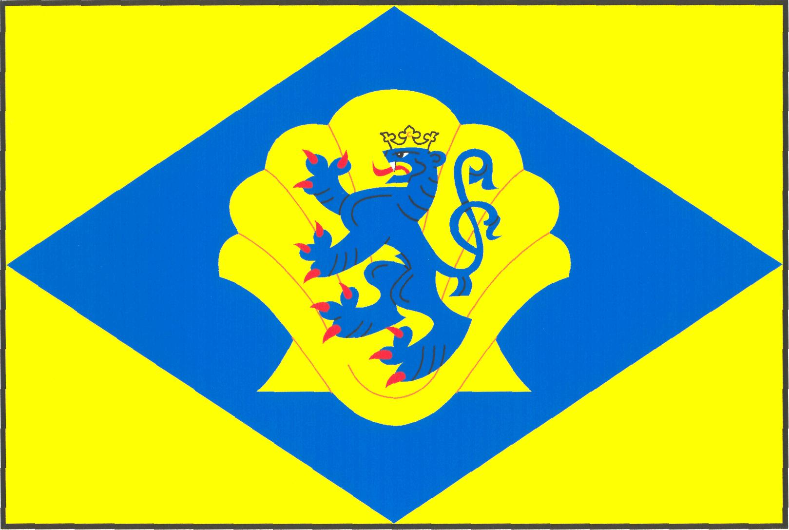 Vlajka obce Chvatěruby